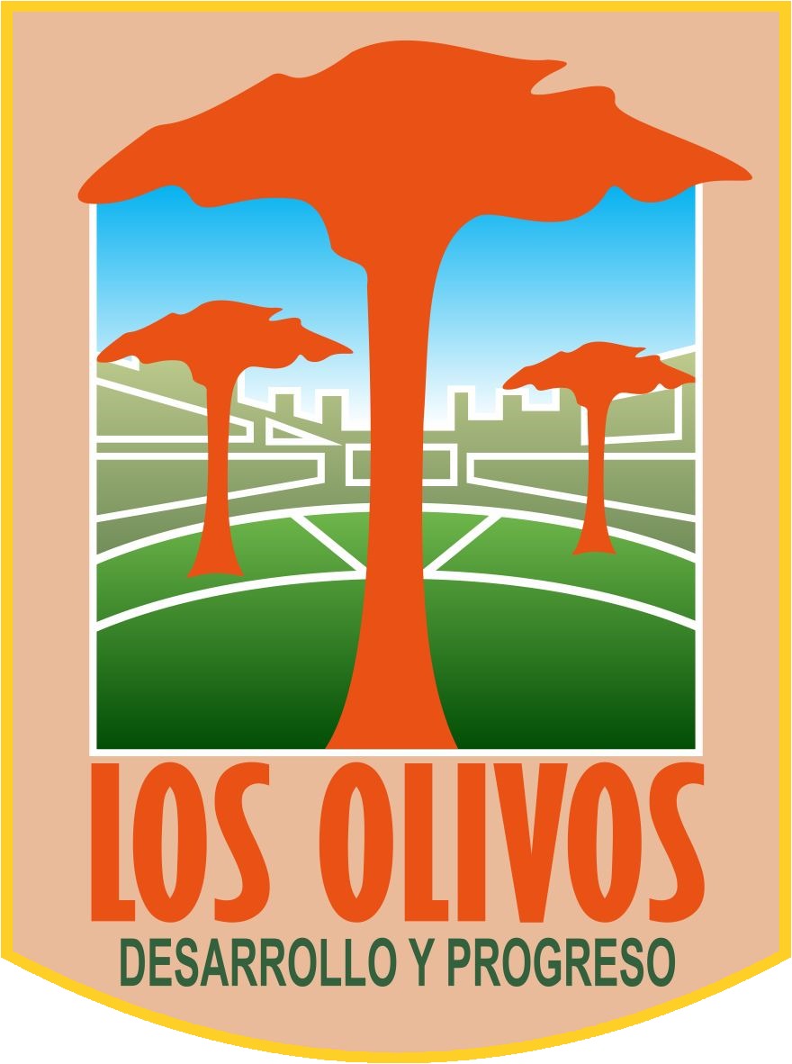 Escudo de Los Olivos, Lima norte